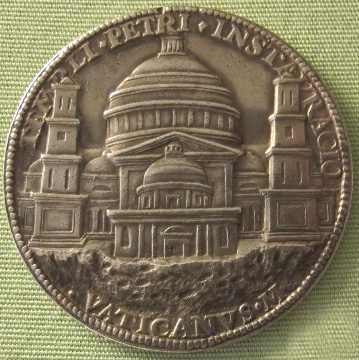 Caradosso, med. di giulio II con progetto di nuovo s. pietro, 1506